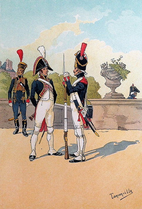 Garde des consuls : marin, musicien des grenadiers et grenadier.